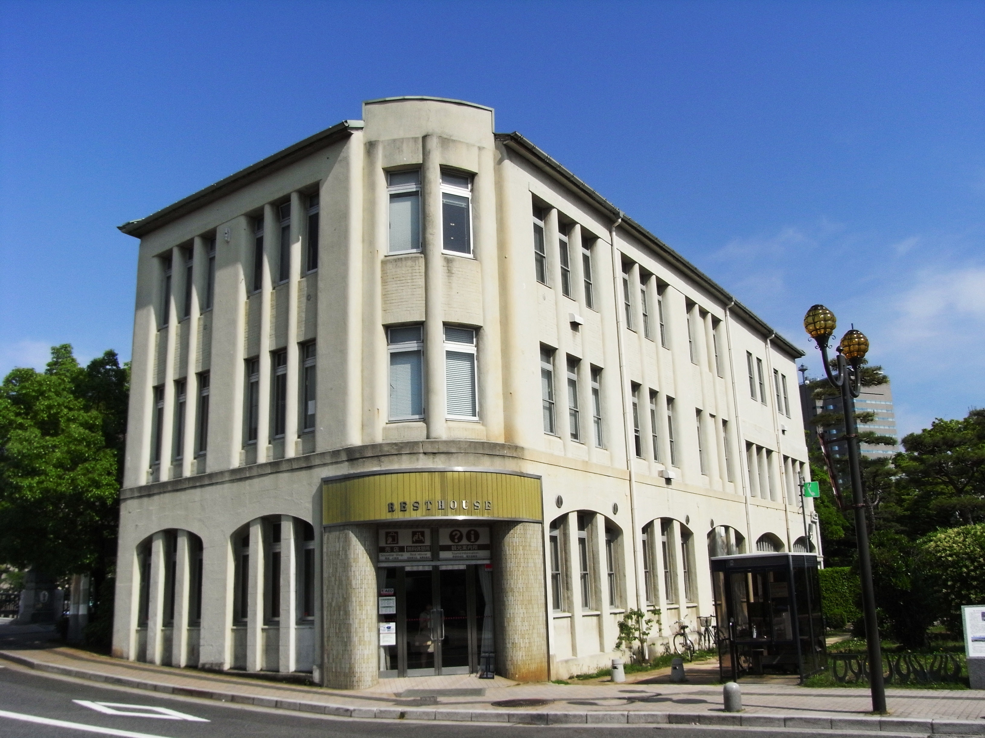 Resthouse Hiroshima(レストハウス (広島市))